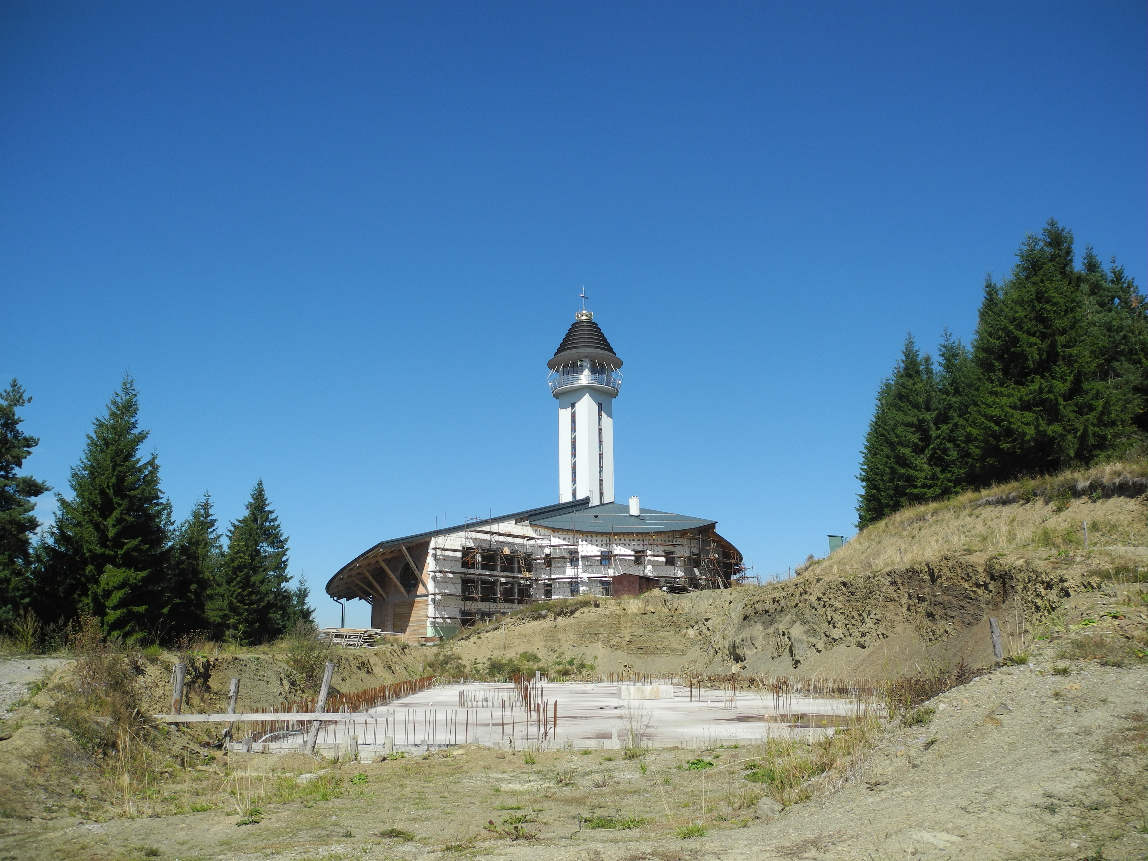 Rozestavěný kostel Panny Marie Matky Církve (Živčákova hora)